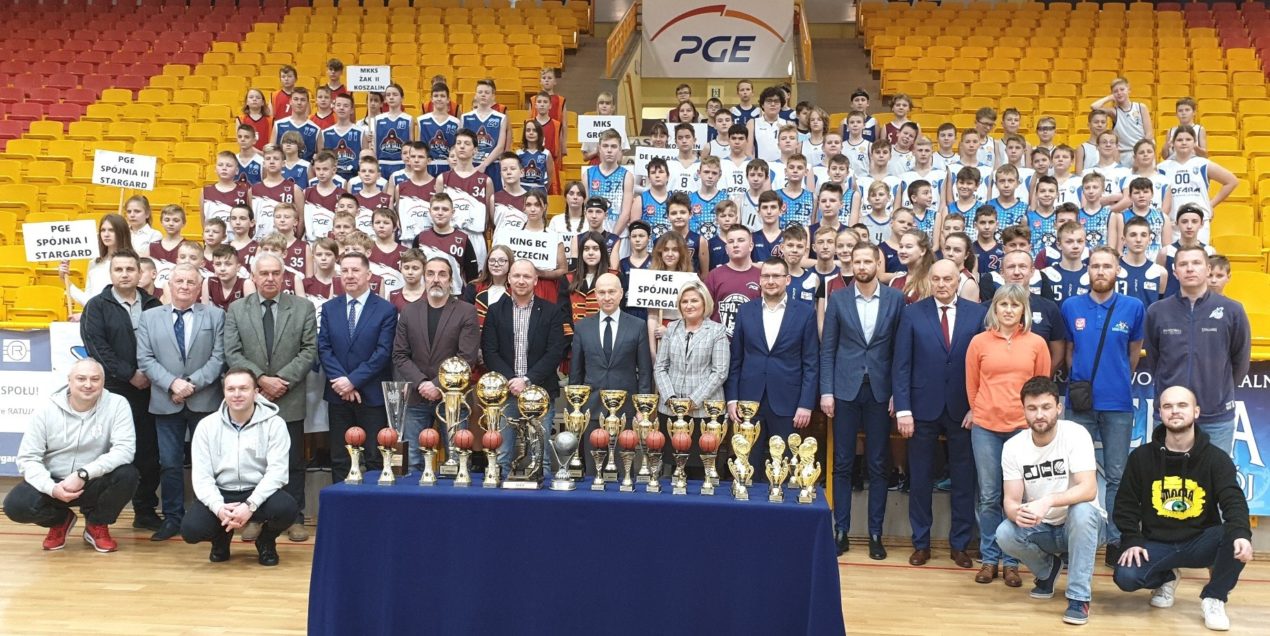 XXII Ogólnopolski Turniej Koszykówki o Puchar Prezydenta RP